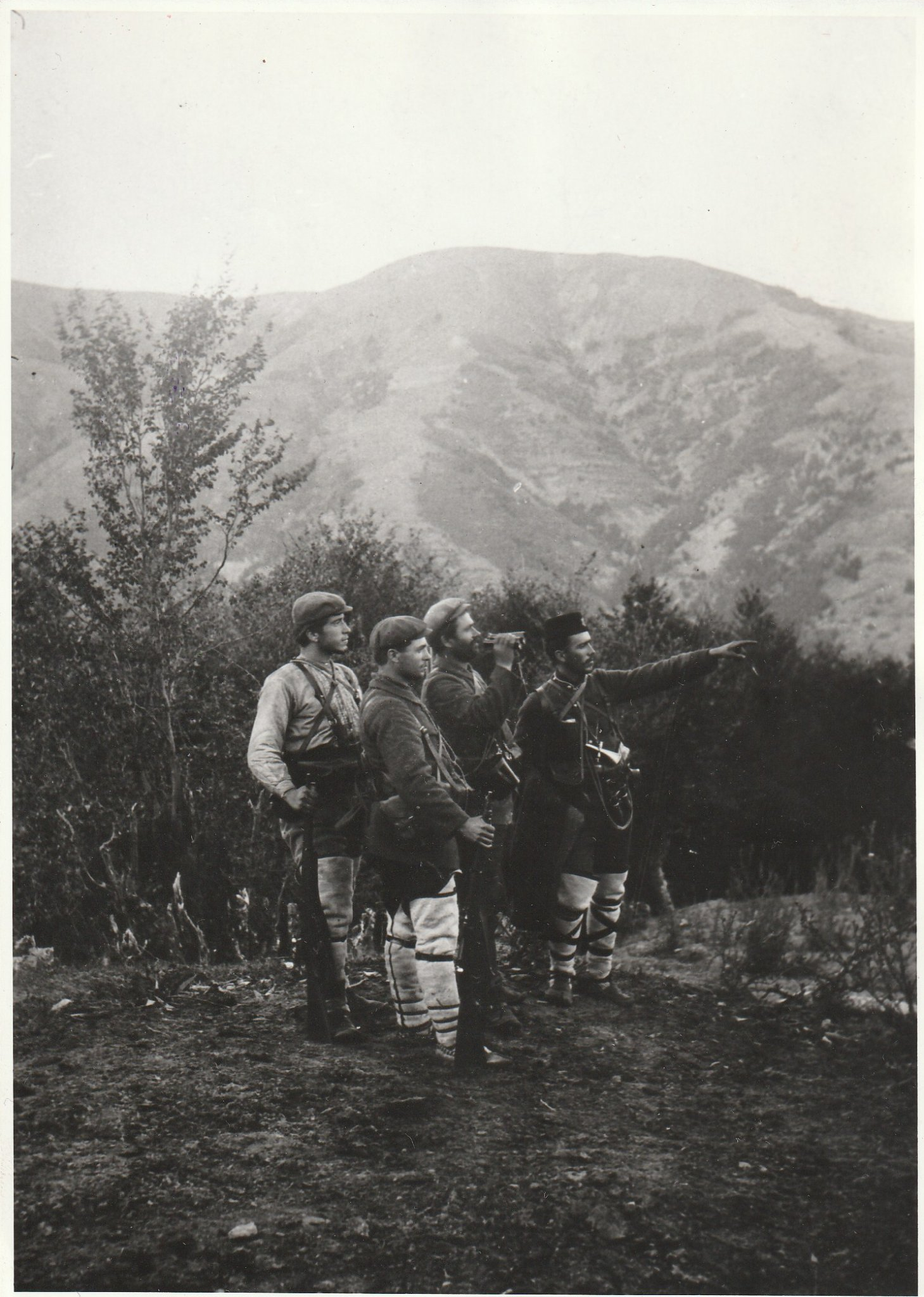 Щабът на четата на Христо Чернопеев.